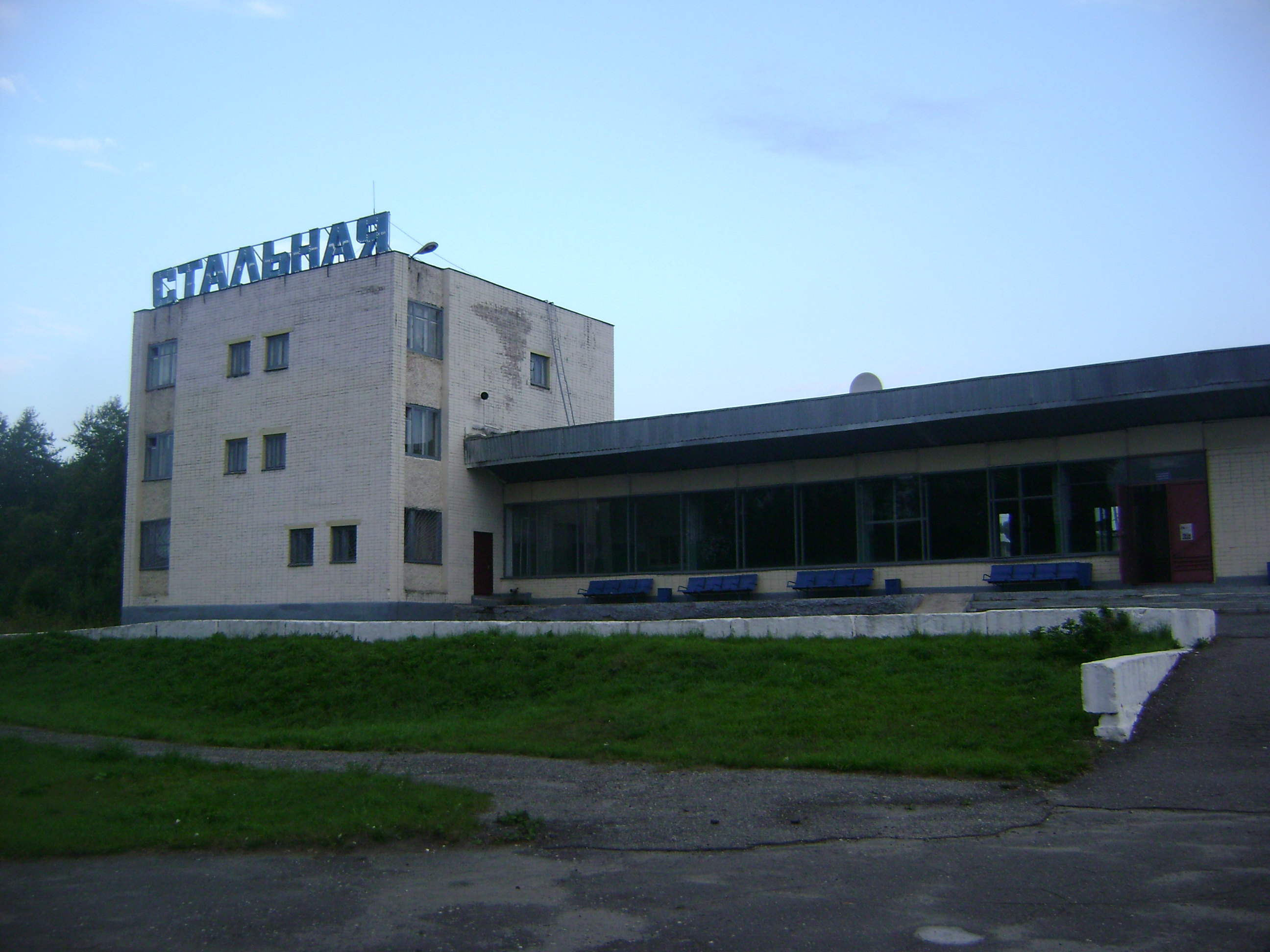 Станция Стальная (вокзал Омутнинска)